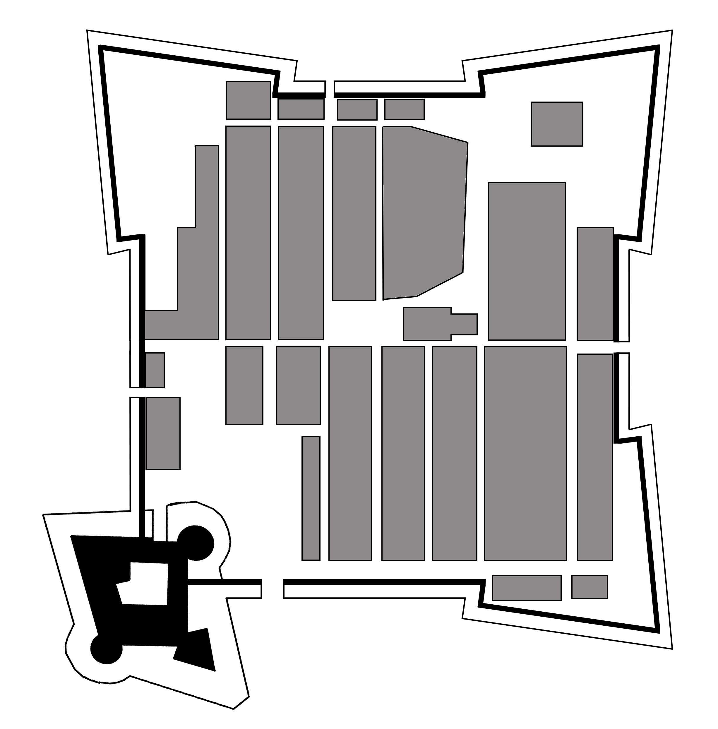 Mappa della cittadina fortificata di Acaya. (Il castello l'ho preso da acaya alto.png e per il resto mi sono basato su Google maps)